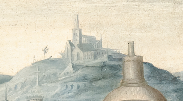 Détail de